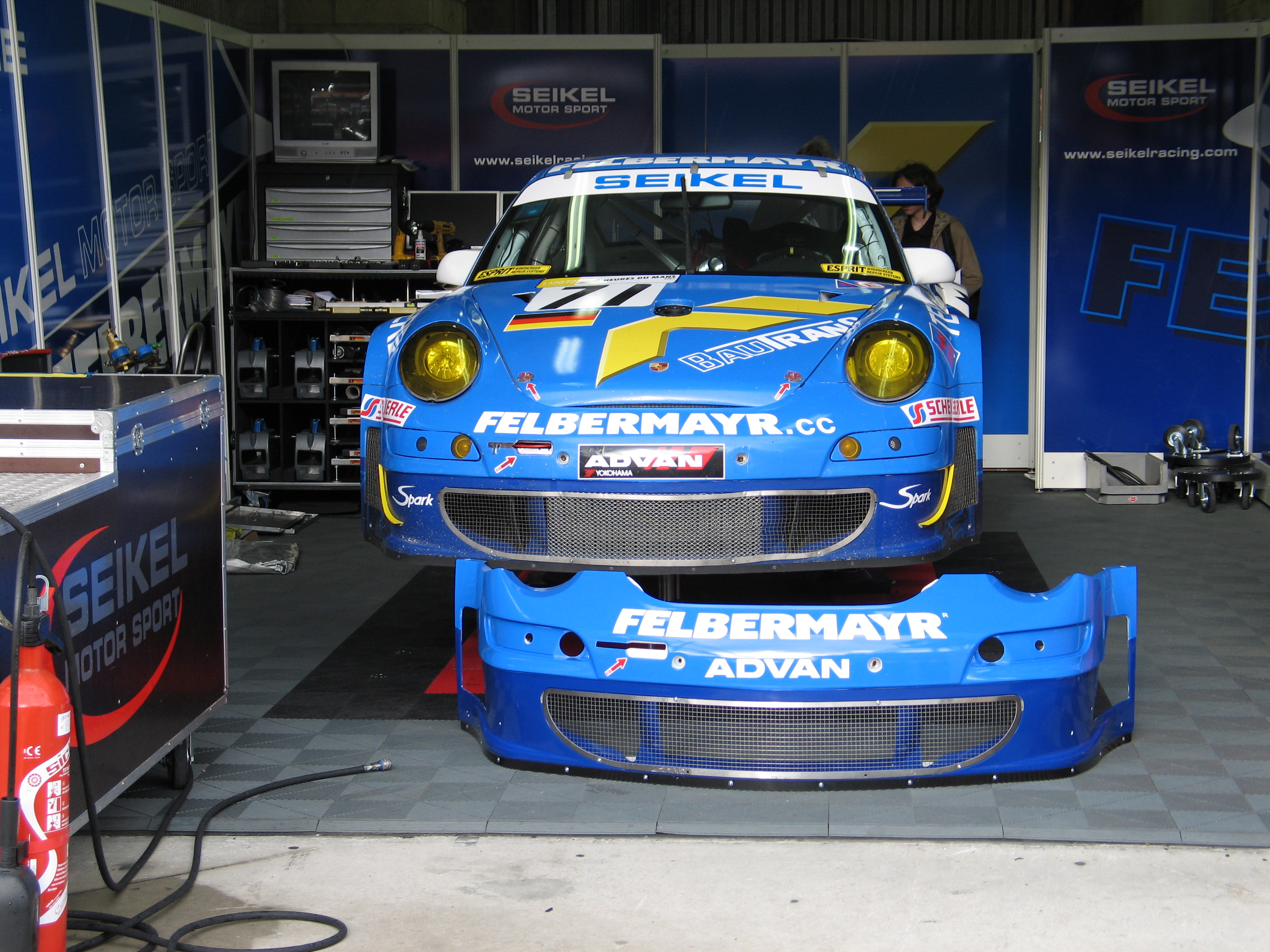 Seikel Motorsport Porsche 997 GT3 RSR No. 71 WP0ZZZ99Z7S799937Seikel Motorsport LMGT2